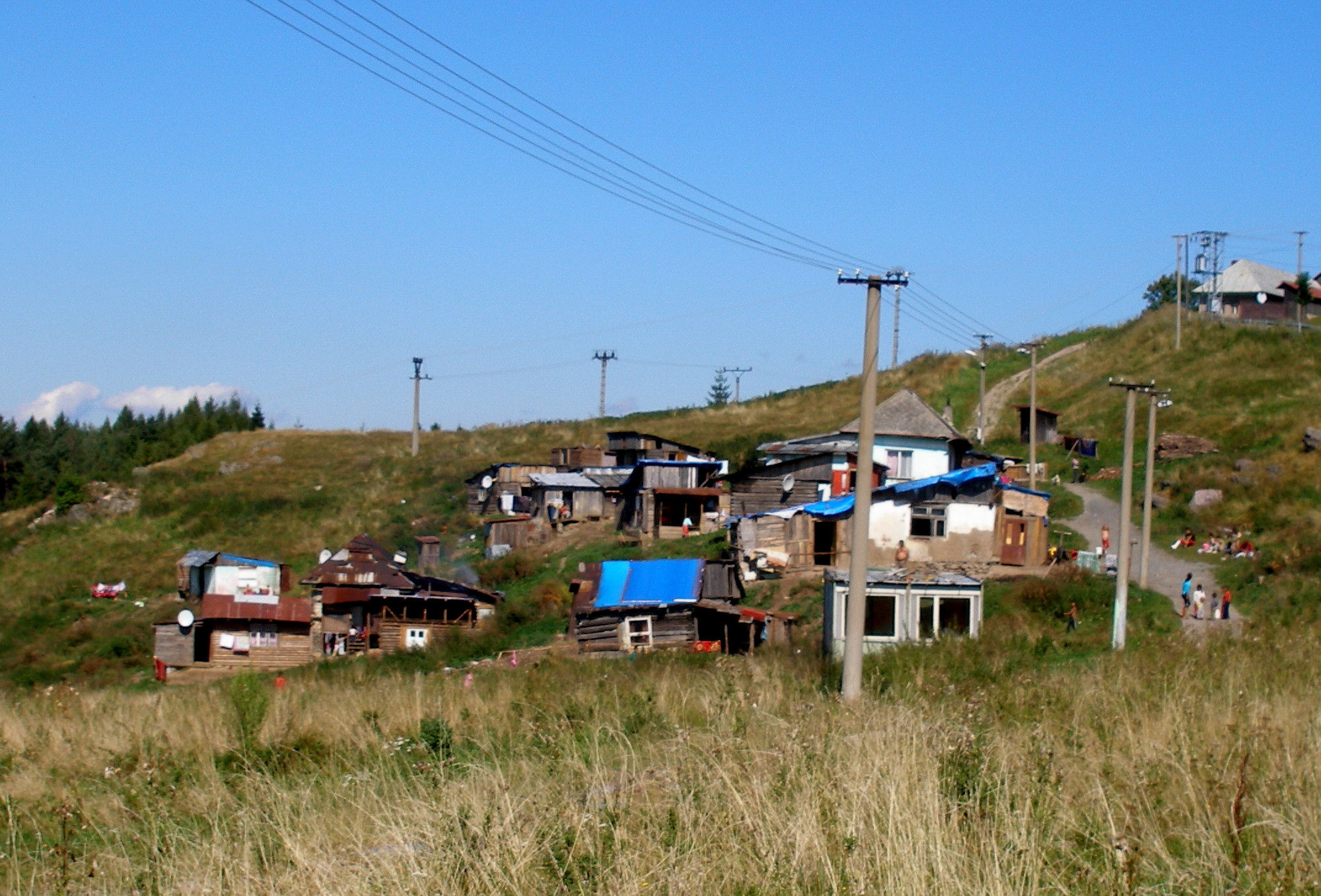 Spišská obec Závadka okres Gelnica.